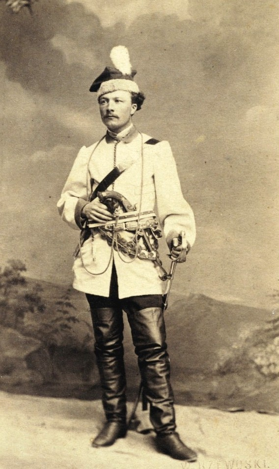 Henryk Schmitt